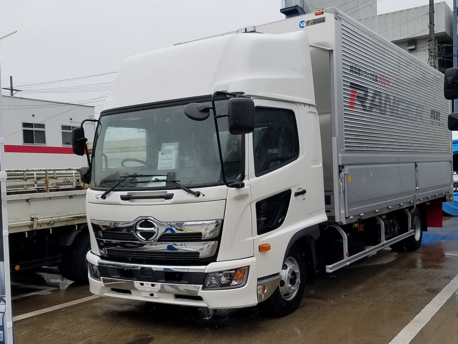 レンジャー(2017年モデル)